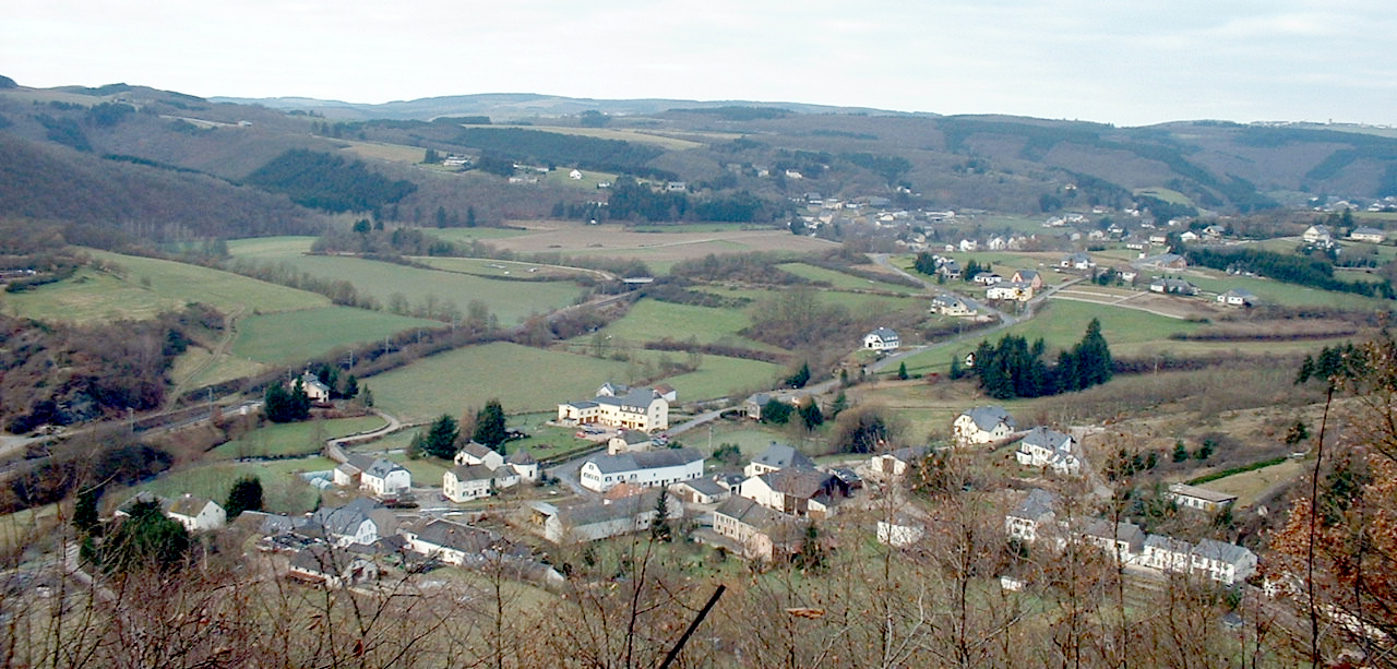 Vue op Lellgen